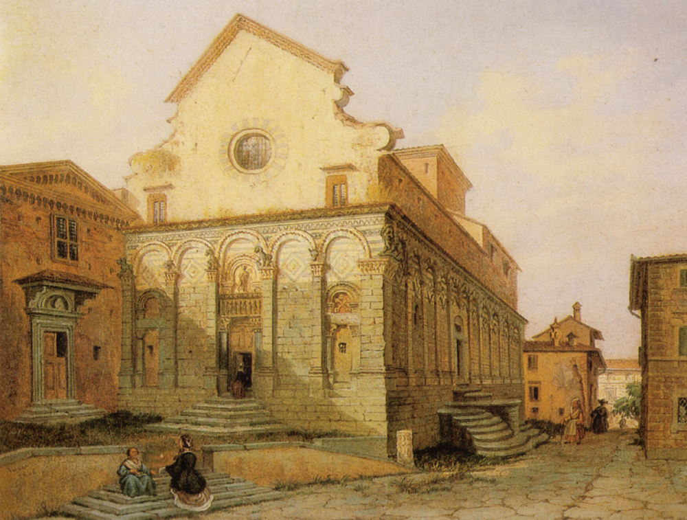 Chiesa di san pier maggiore di pistoia, painting dated 1865, maybe by E. Burci